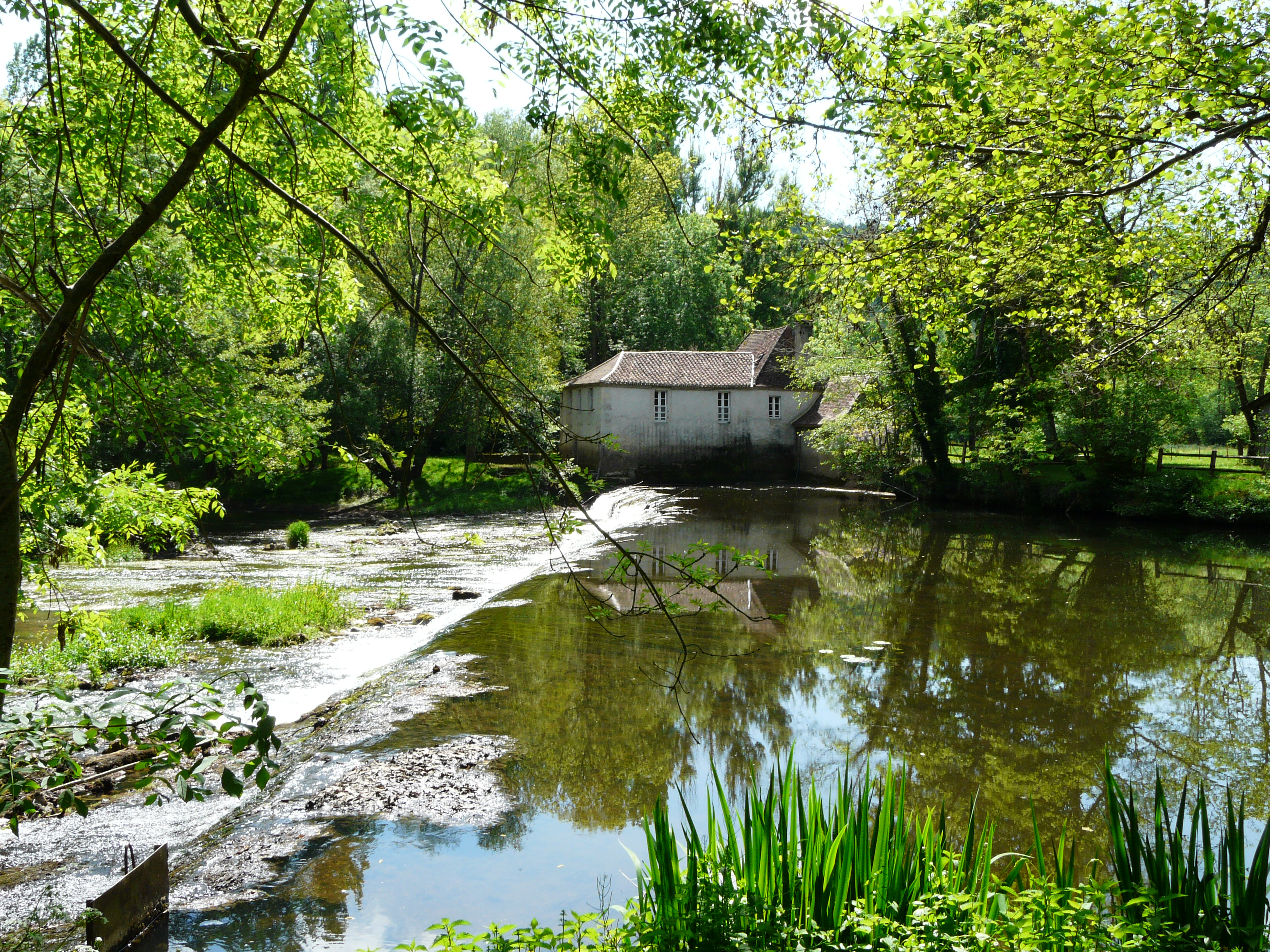 Barrage et ancien moulin de Redrol sur l'Auvézère, en aval du pont de la route départementale 5E7, Le Change, Dordogne, France.